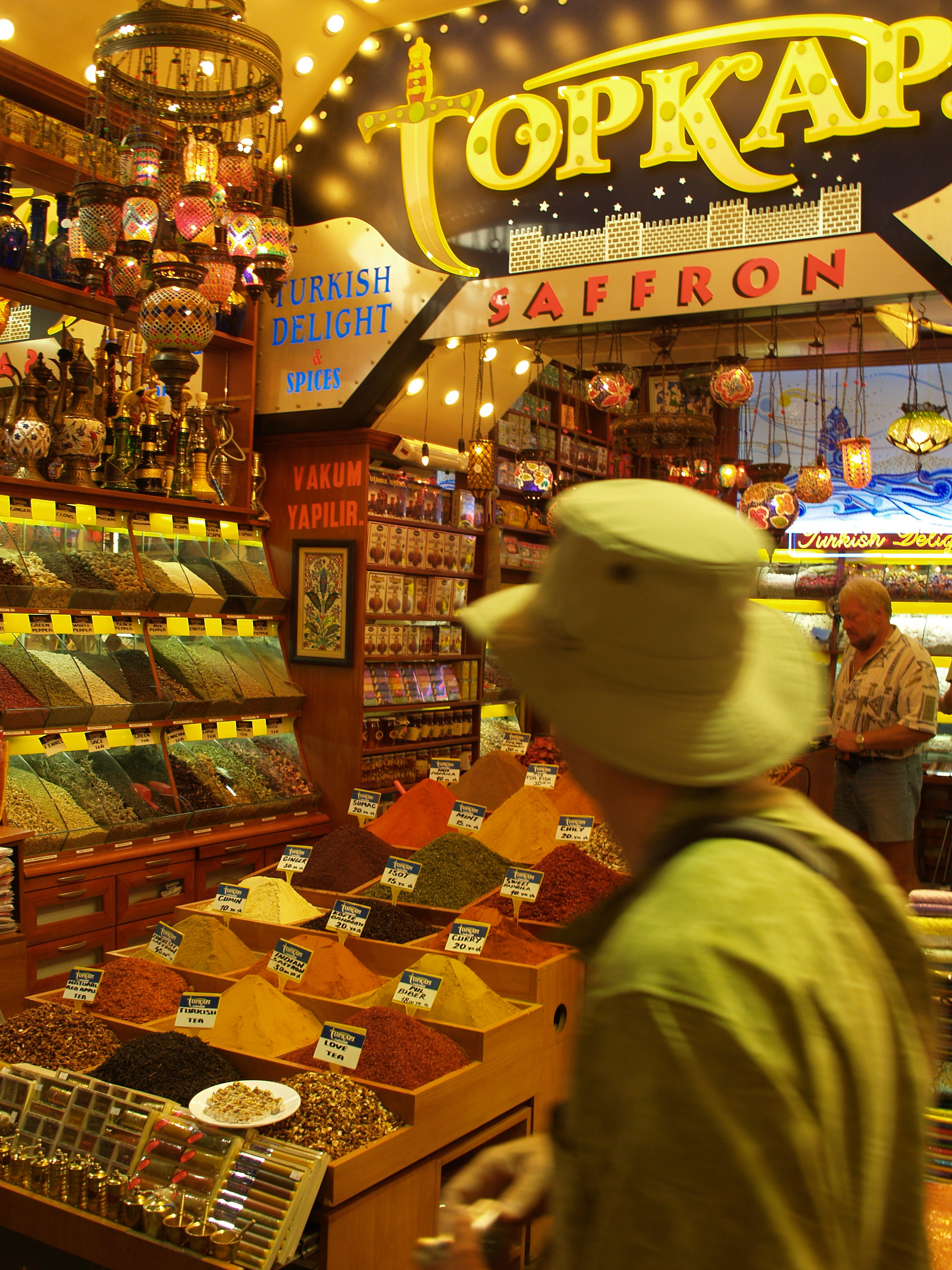 Turkey, Istanbul Spice Bazzar